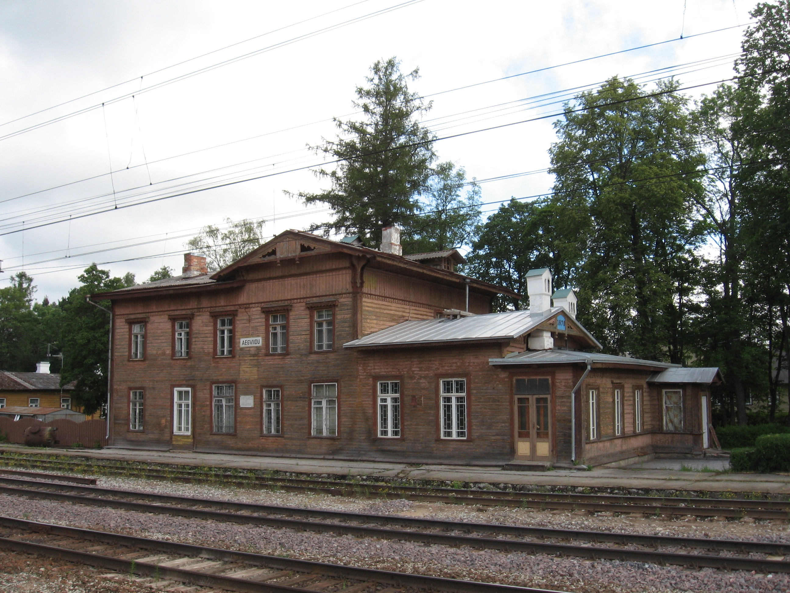 Aegviidu jaama peahoone